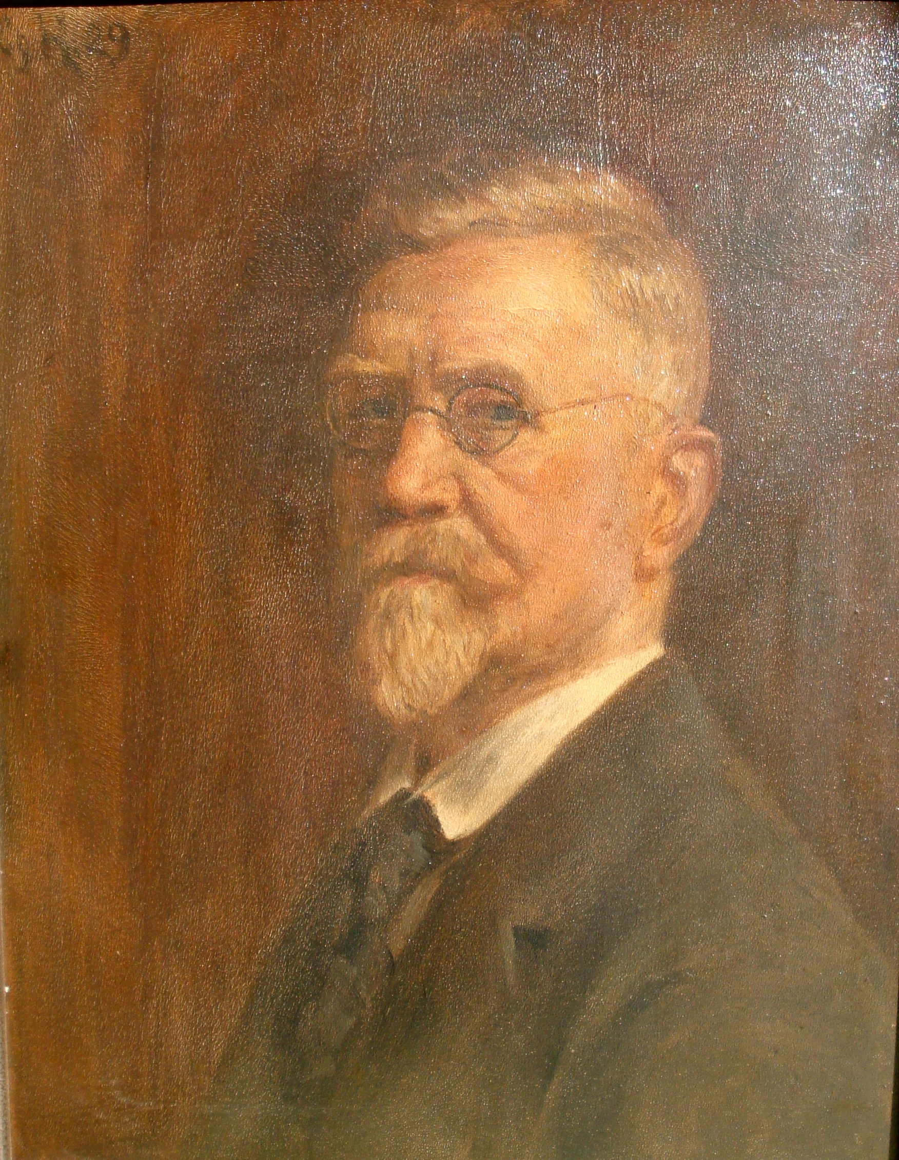 Selbstportrait Christian Heyden